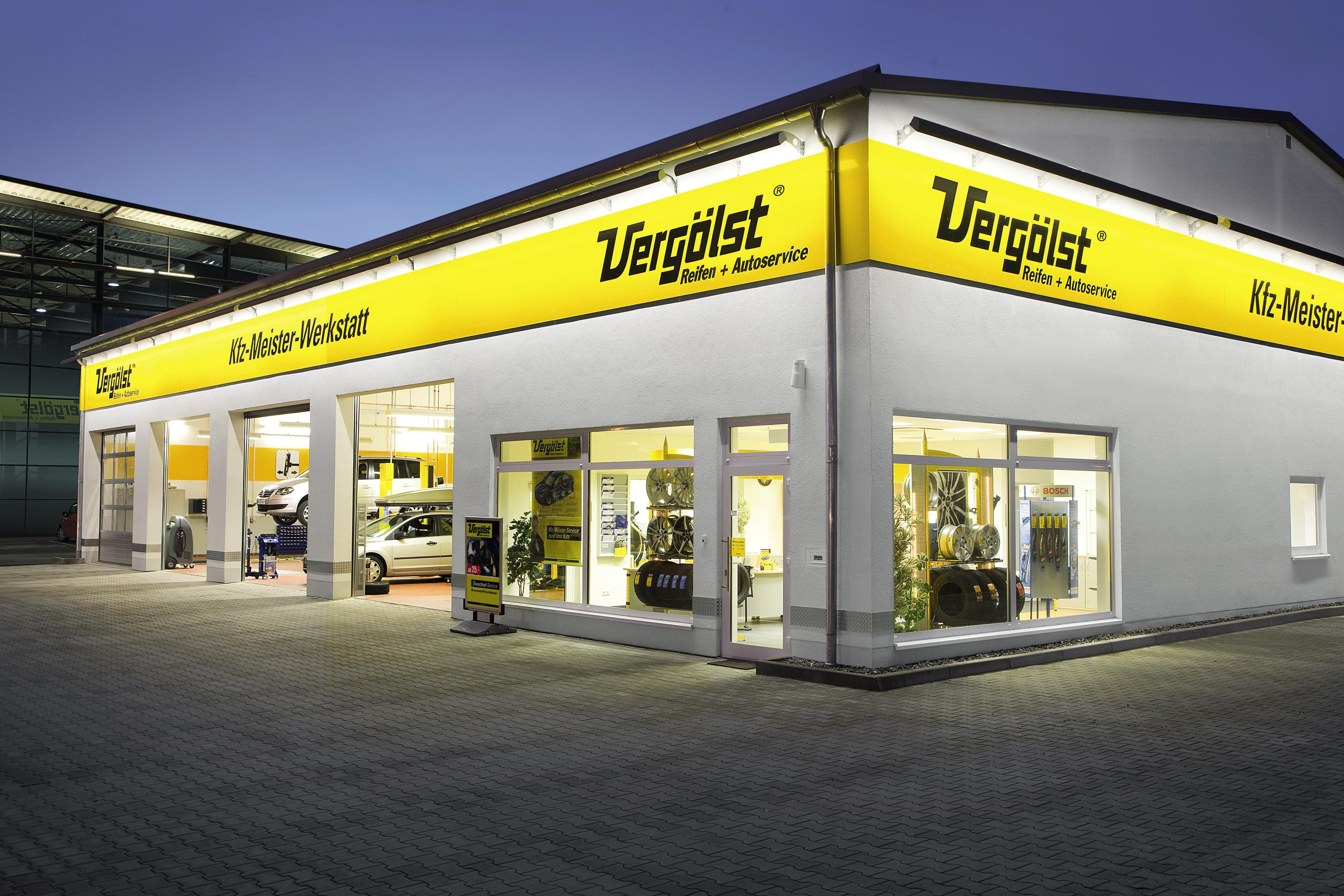 Vergölst Fachbetrieb Neu Ulm